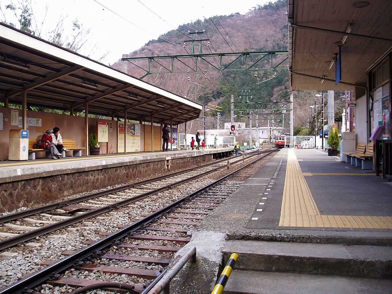 Kowakidani Station, on the Hakone Tozan Line, Hakone, Kanagawa